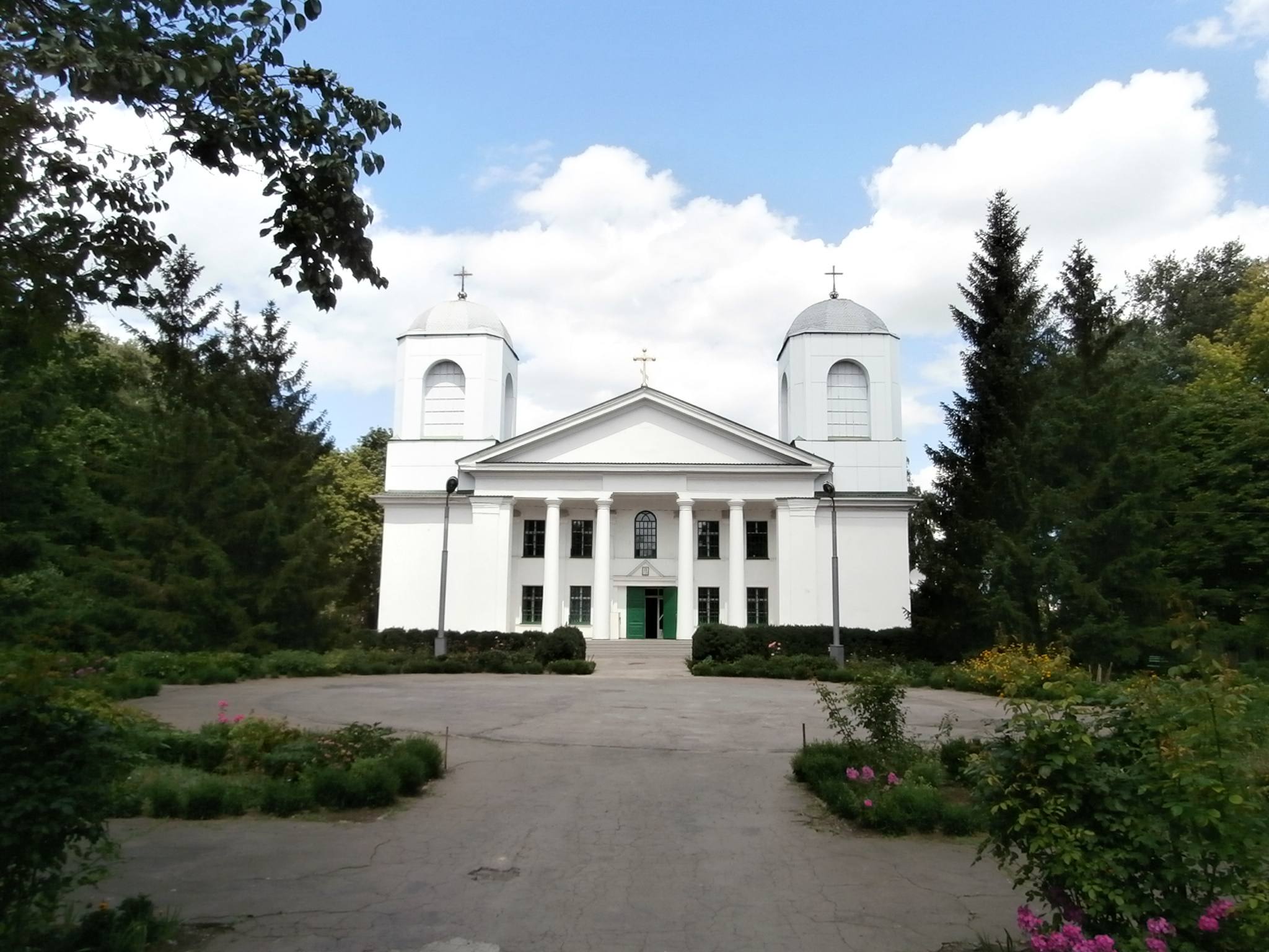 Schowti Wody Alte orthodoxe Kirche totale